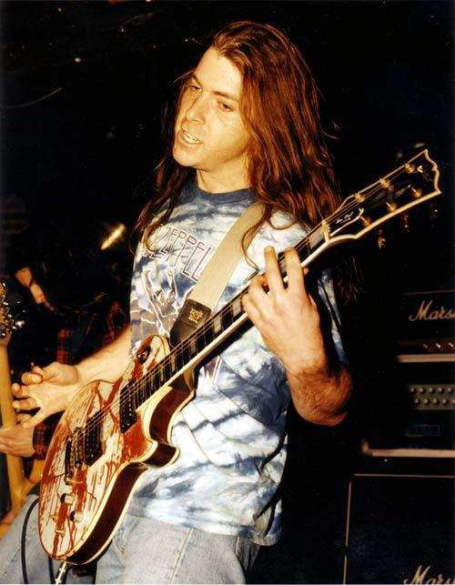 Jim Adams, lead guitarist